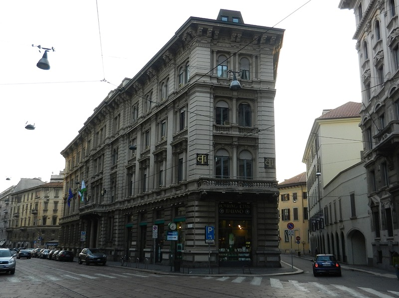 Milano - Palazzo Bertarelli (Sede del Touring Club Italiano)